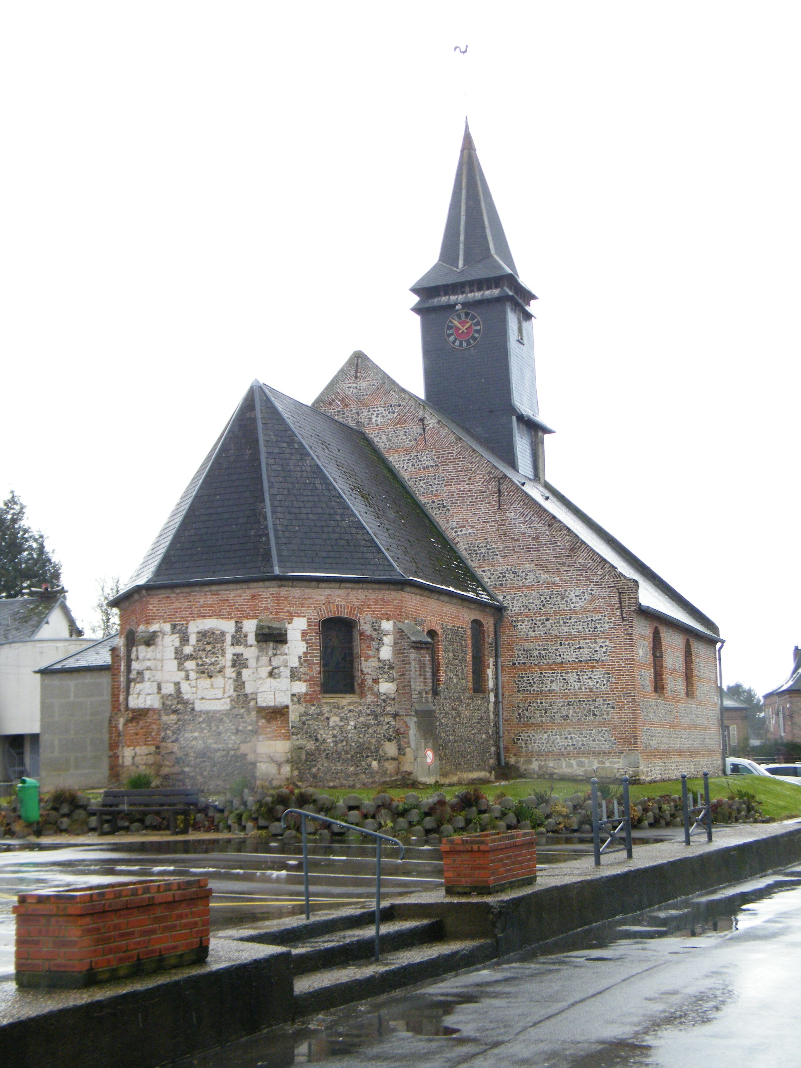 Le chevet de l'église.